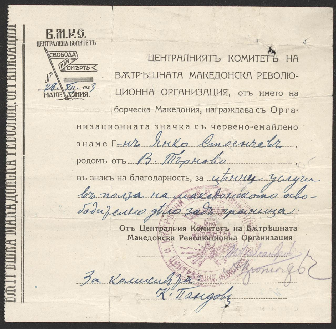 Документ на ЦК на ВМРО за награждаване на търновеца Янко Стоянчов с значка с червено емайлено знаме за заслугите му към македонското освободително дело с подписа на Тодор Александров.